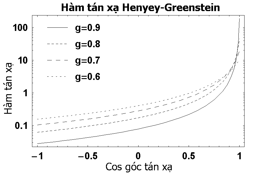 Hàm tán xạ Henyey-Greenstein cho một số giá trị của hệ số bất đối xứng. Vẽ bởi người truyền lên.